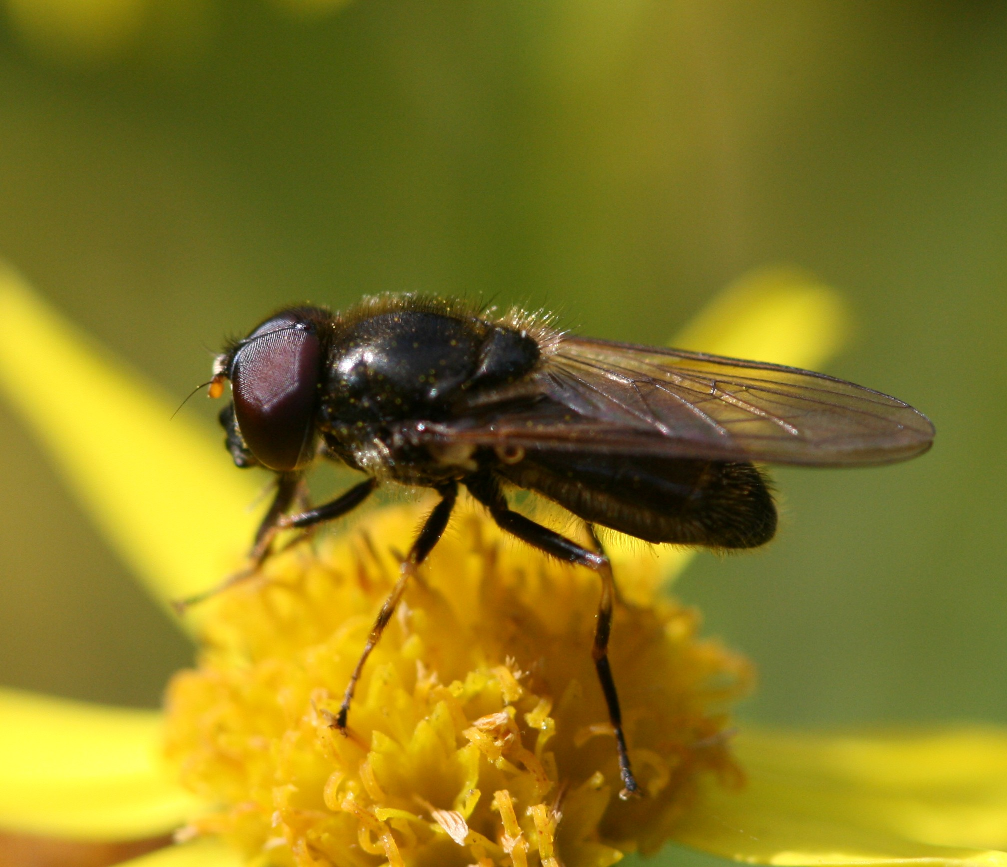 Cheilosia bergenstammi (male)